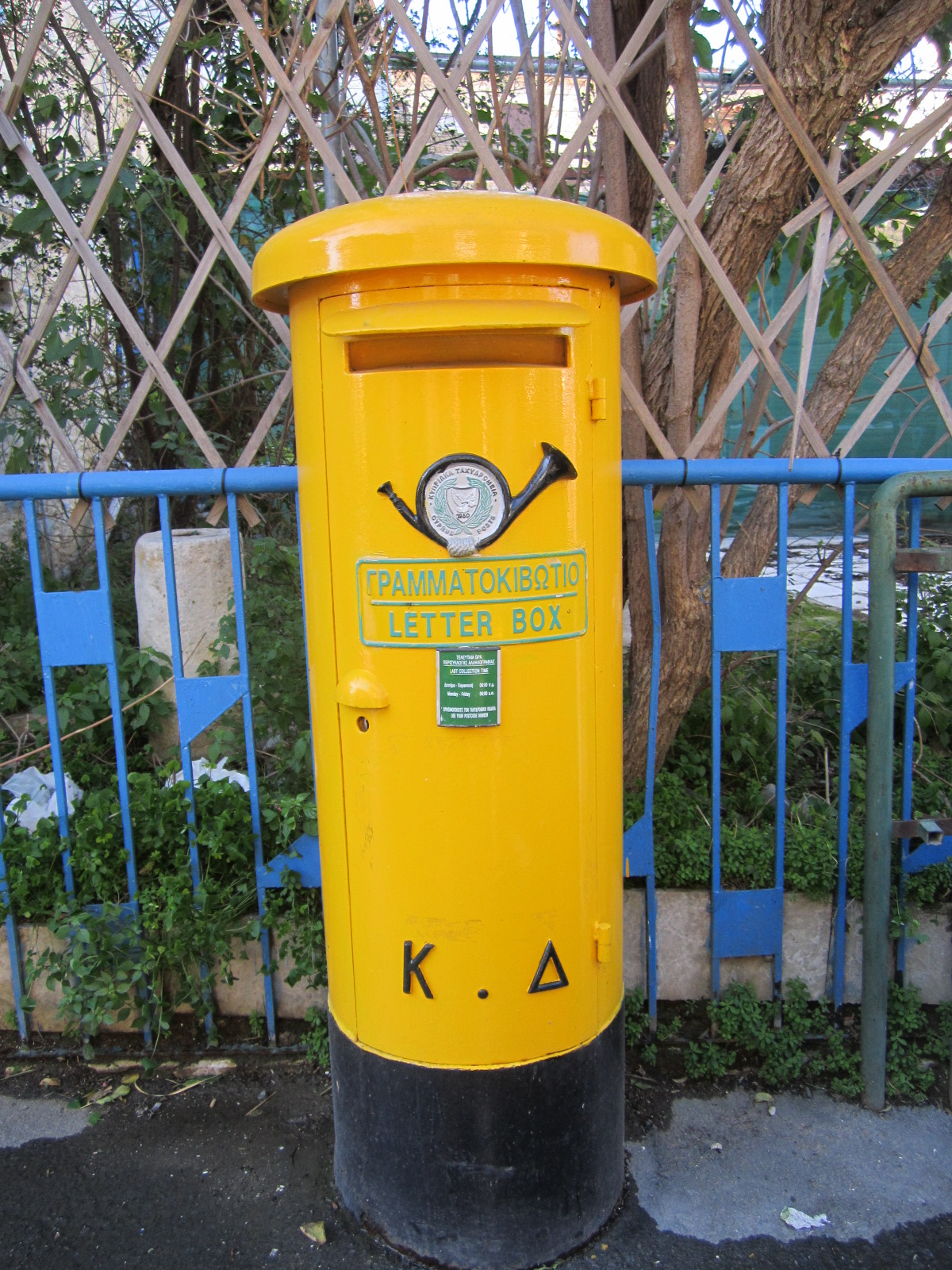 תיבת דואר קפריסאית בעיצוב מודרני.